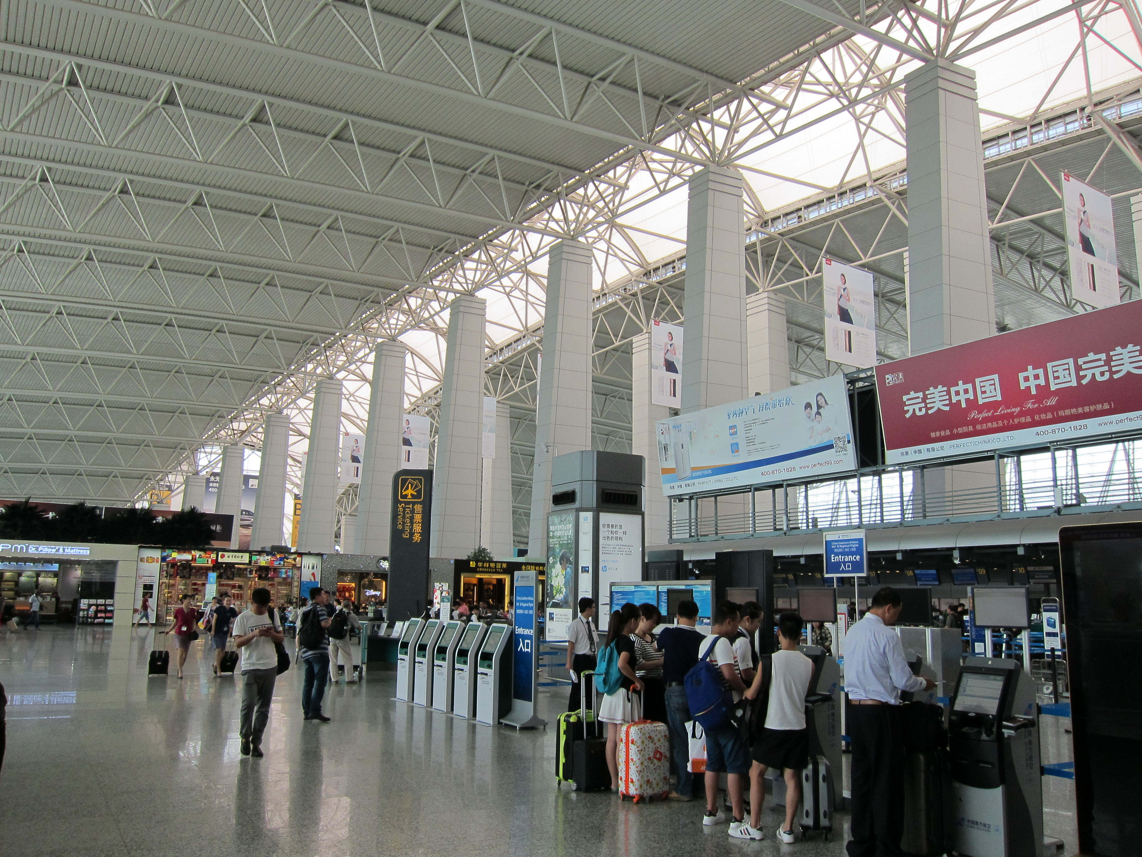 ATMを求めて隣のターミナルへ。